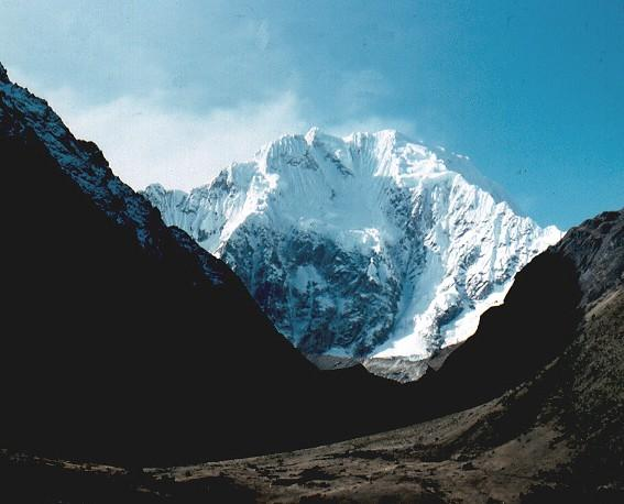 Finalizando la primera jornada de aproximación a la montaña desde el pueblo de Mollepata, el valle se cierra con la visión del Apu Salcantay por su cara sur.